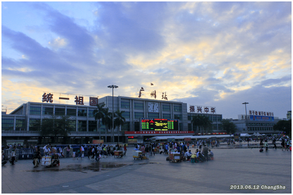 广州火车站